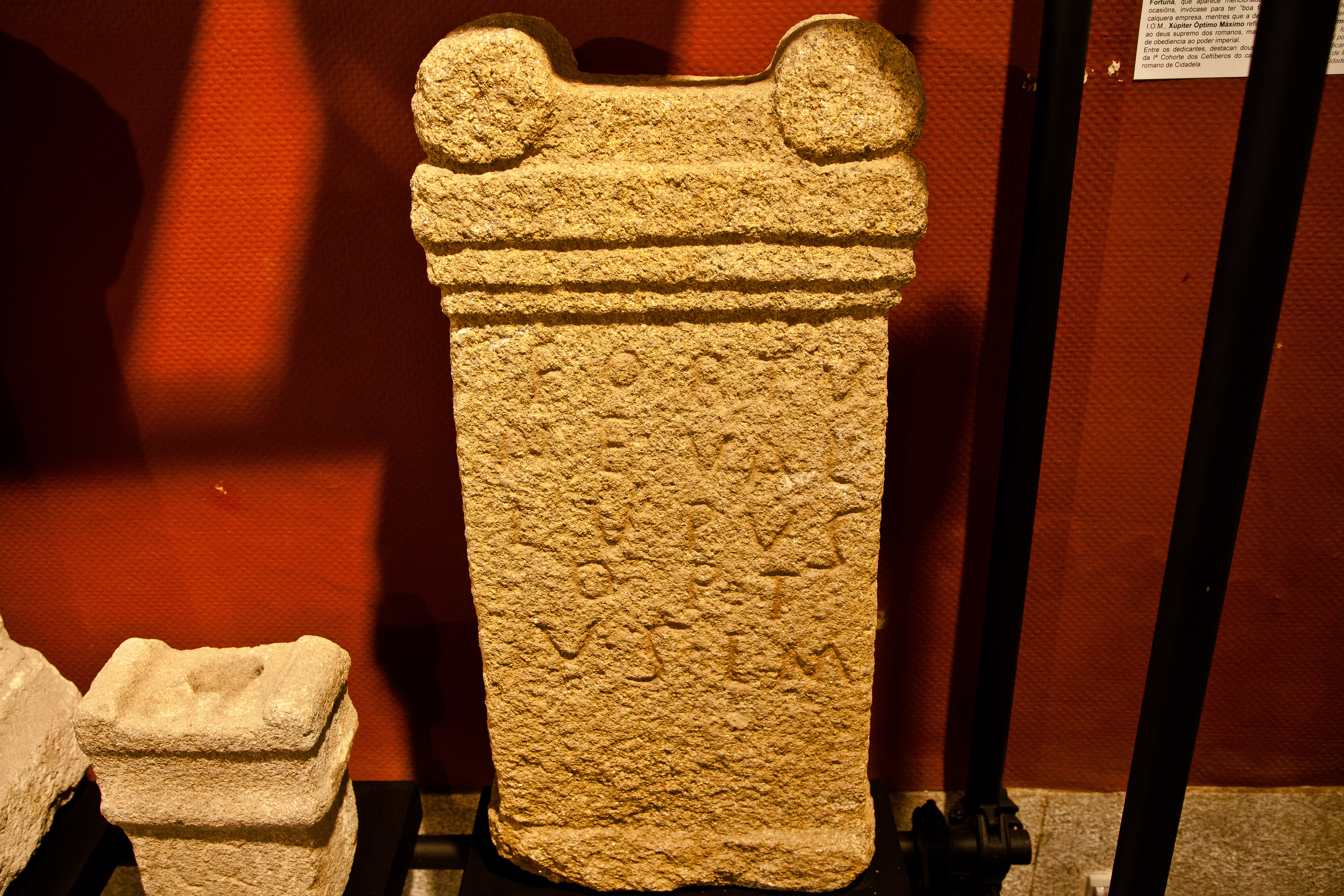 AE 1986, 387 = AE 2002, 650 = CIRG-01, 31 FORTV/NE VAL(erius)/ LVPUS/ OPT(io)/ V(otum) S(olvit) L(ibens) M(erito) A Fortuna.. Valerio Lupo, asistente de centurión, cumpriu de libre vontade o seu voto. Procedencia: campamento romano de Cidadela, Sobrado dos Monxes, A Coruña. s.II d.C.